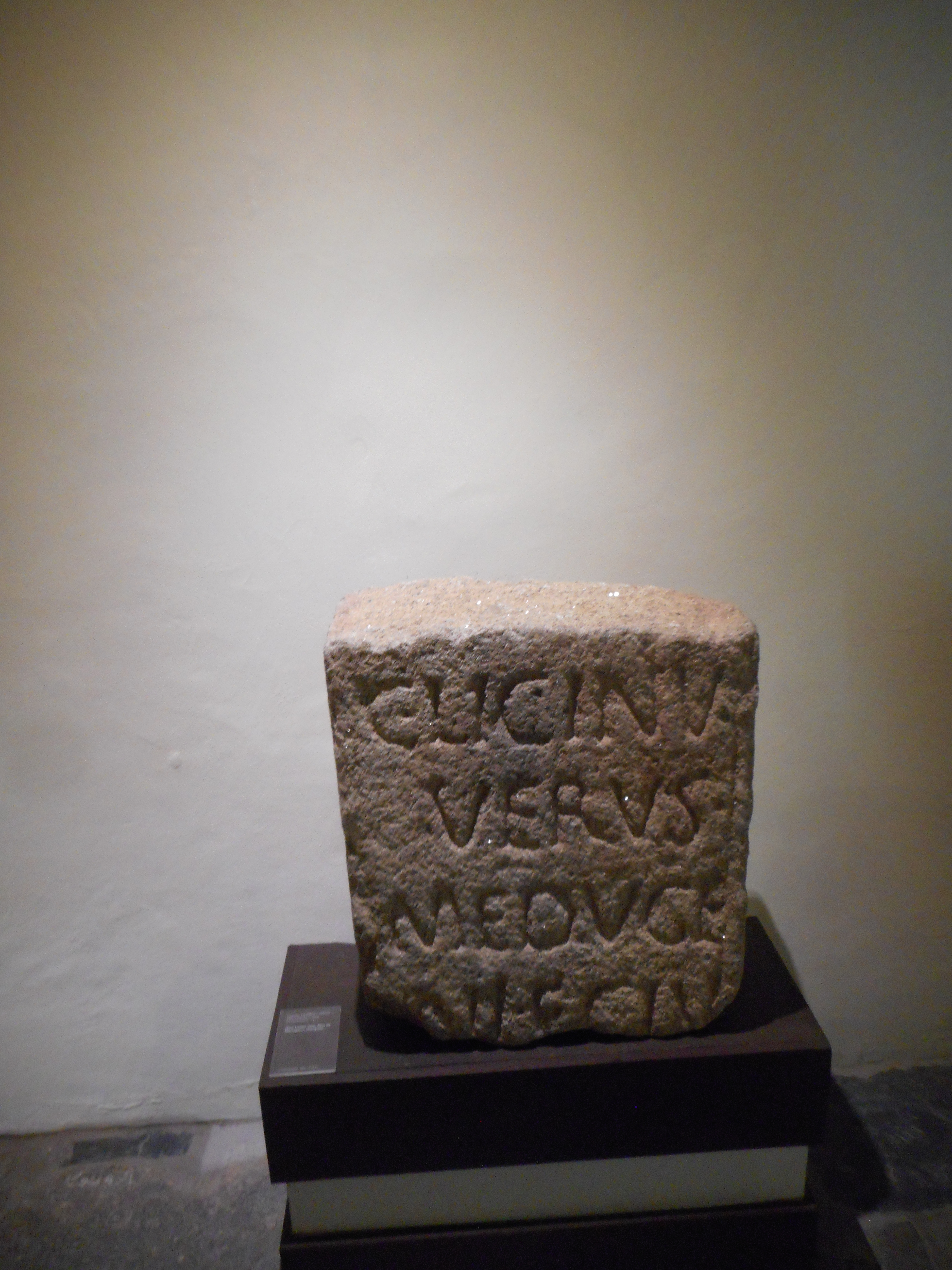 Inscripción funeraria romana procedente de São Salvador de Aramenha (Marvao, Portugal) depositada en el Museo dedicado a Ammaia en la localidad, correspondiente con CIL II 162 = IRCP 620: C(aius) Licinius / Verus / Meduge/ni f(ilius) Clu(niensis) / [